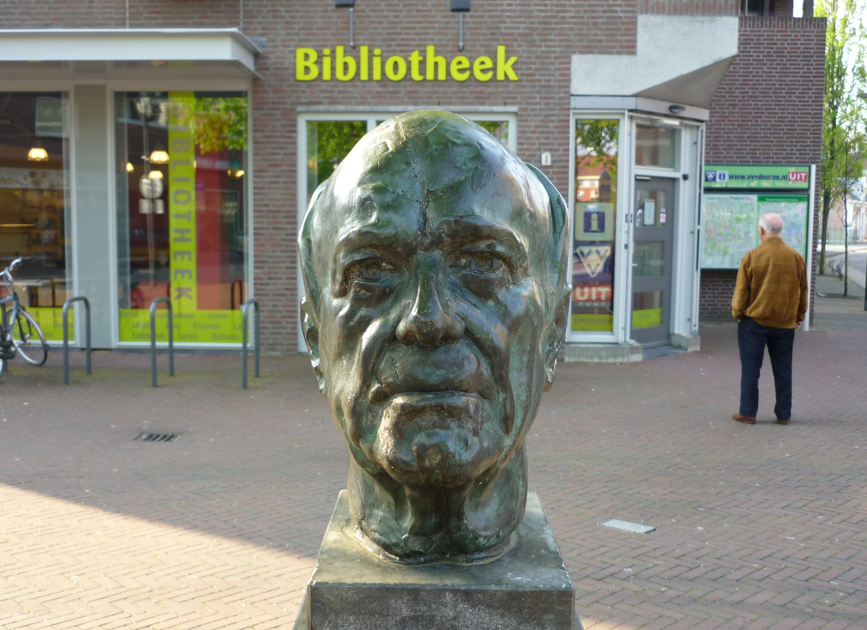 beeld van Toon Kortooms, gemaakt door Jos Reniers, op de Markt in Deurne, april 2010